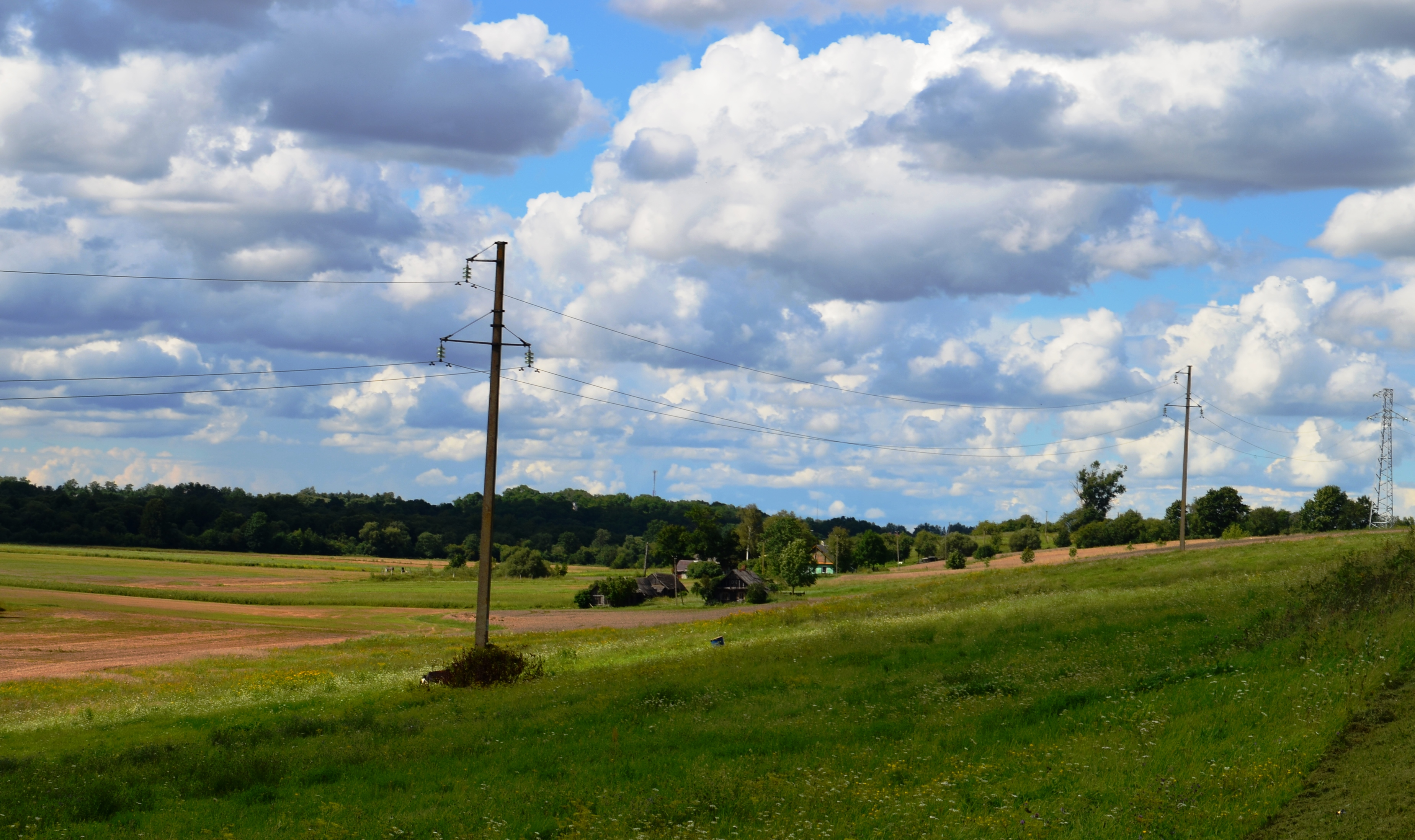 Galkantai, Kėdainių raj.